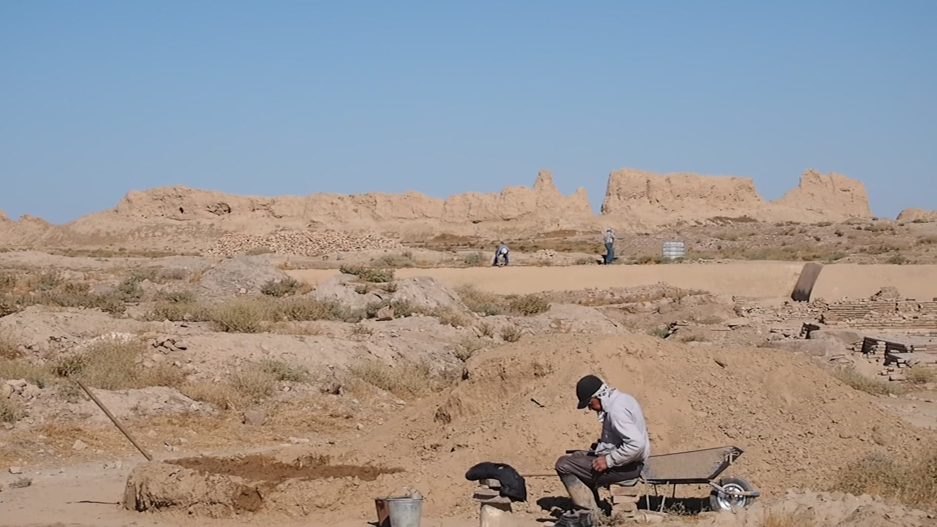 P9150407 231